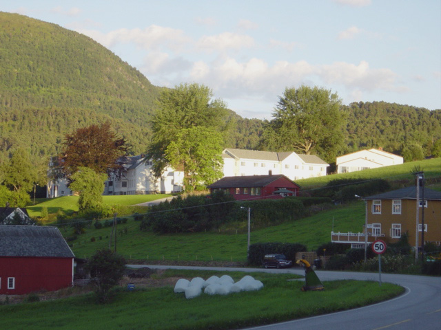 Gjemnes and the Høgtun folkehøgskole